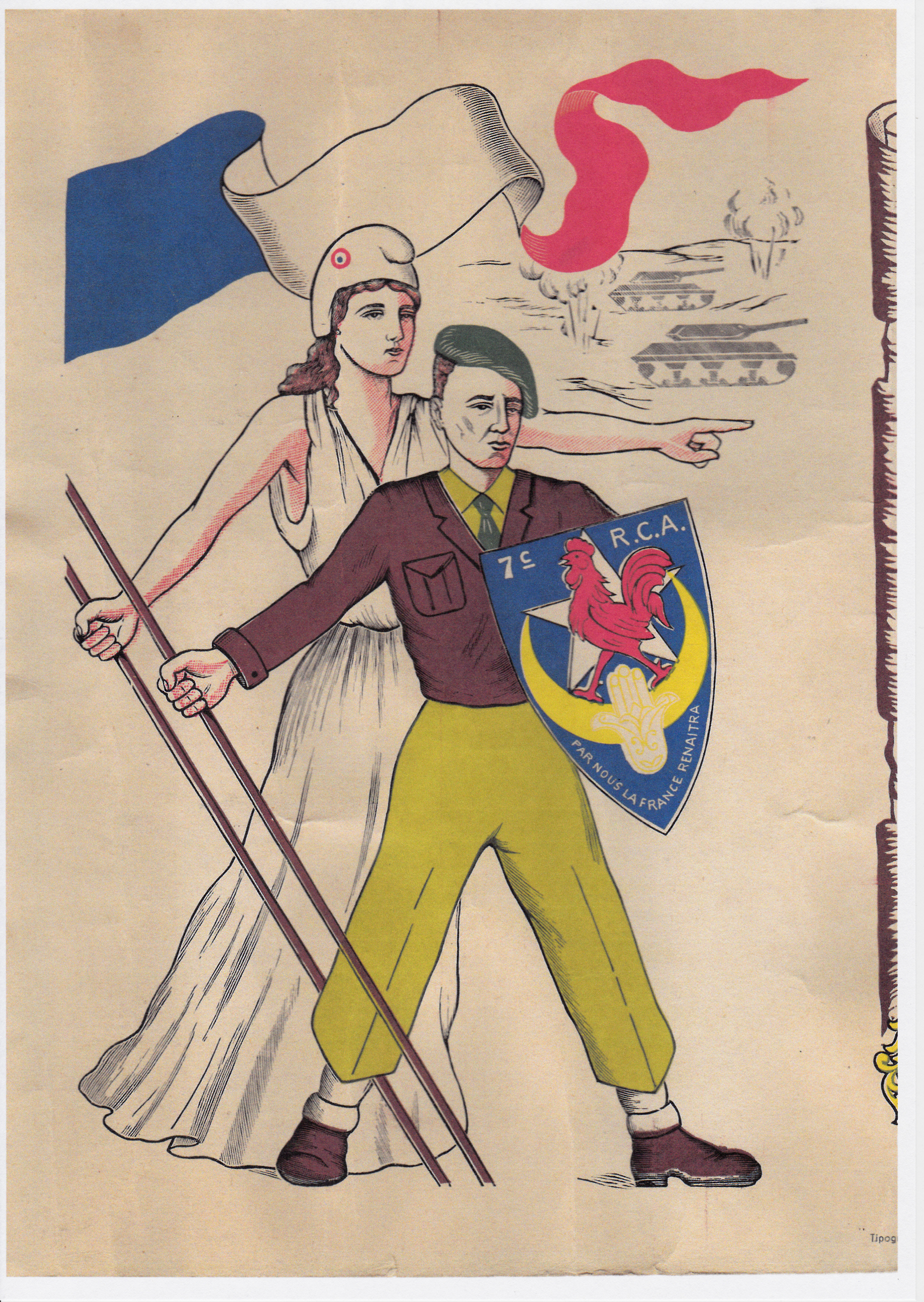 Moitiè gauche d'un document de citation à l'ordre du régiment d'un cavalier du 7e RCA décédé à l'âge de 91 ans. Par héritage familial